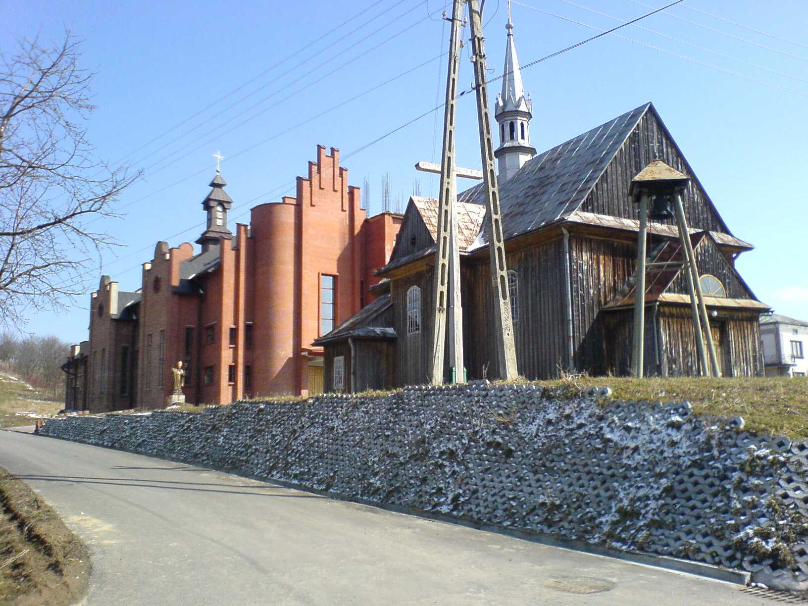 Kościoły w Górkach